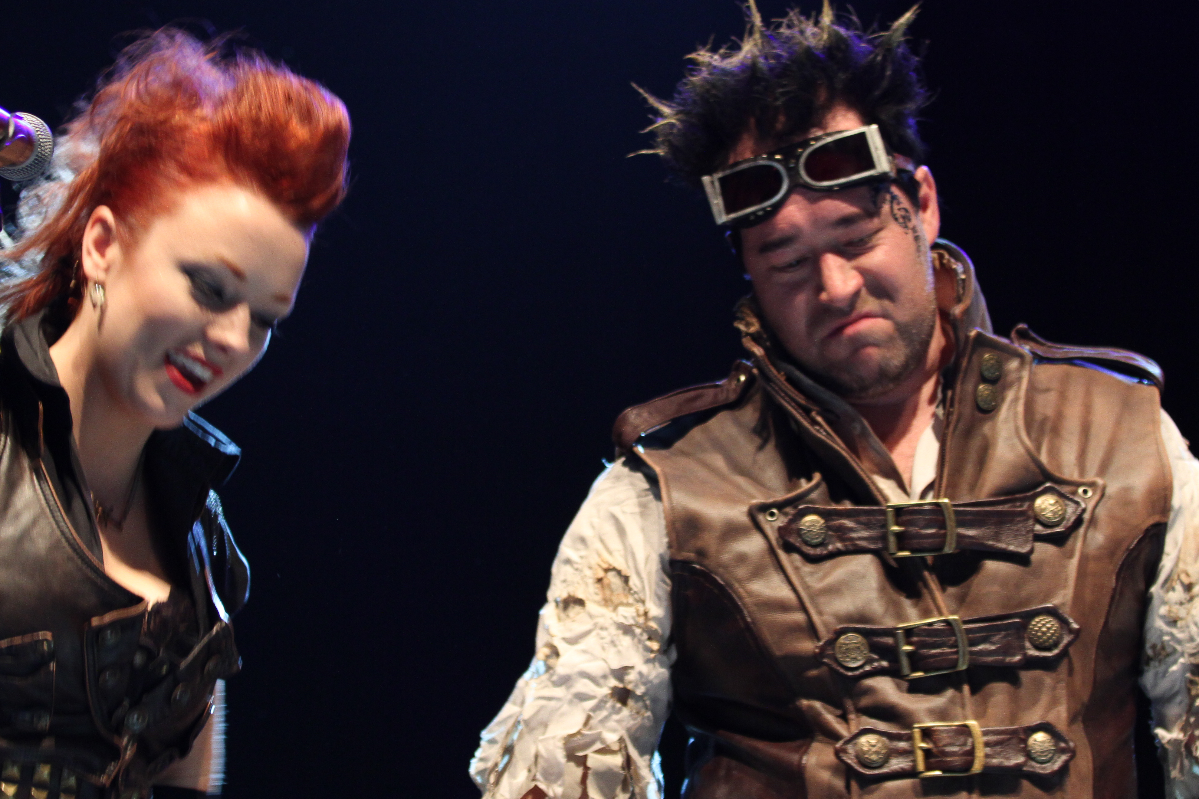 Abney Park auf dem Wave-Gotik-Treffen 2013 in Leipzig, Agra-Halle.